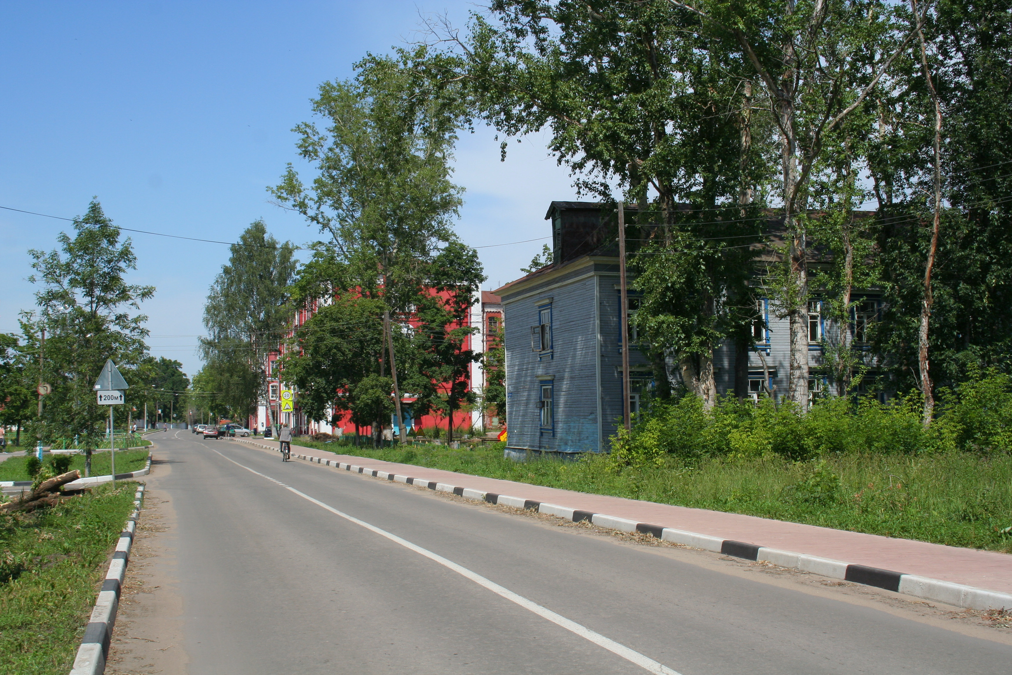 Wohnhäuser in Dresna, Oblast Moskau, Russland.